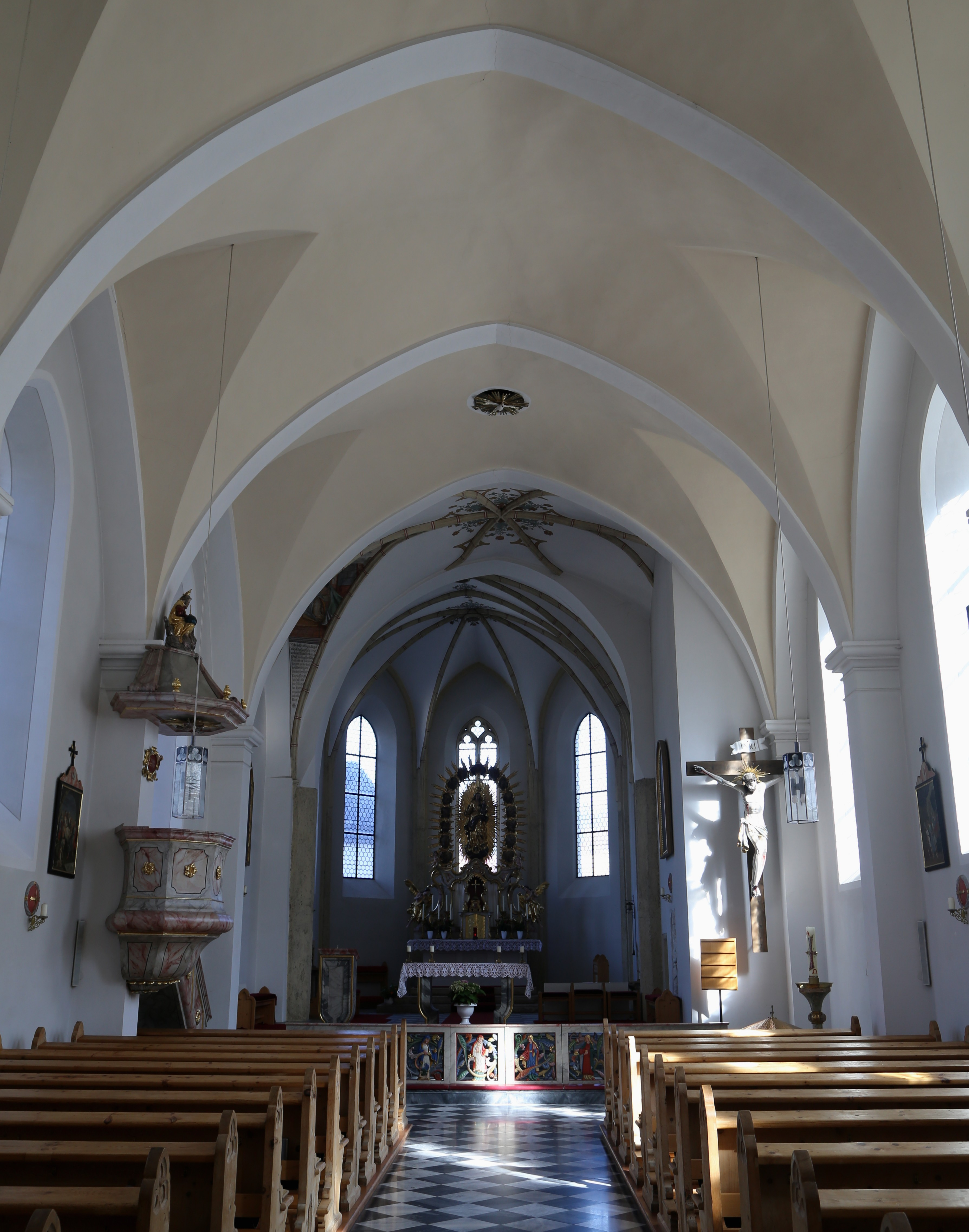 Kath. Pfarrkirche Mariä Himmelfahrt, Dorfplatz, Pfaffenhofen (Tirol); Über einer frühchristlichen Kirche wurde im 14./15. Jahrhundert ein spätgotischer Bau errichtet, der im 18. Jahrhundert barockisiert wurde. 1860/1863 wurde die Kirche nach Plänen von August Essenwein und Josef von Stadl erweitert und regotisiert. Der einschiffige Bau mit steilem Satteldach, zweijochigem Chor und dreiseitigem Chorschluss weist am Langhaus und Chor eine gotische Gliederung in Form von Dreikantlisenen und einem umlaufenden Kaffgesims auf. Die Westfassade zeigt einen steilen, im Ansatz abgetreppten Fassadengiebel und ein spitzbogig gekehltes Portal. An der Sakristei befindet sich ein Wandbild Auferstehung Christi und Jüngstes Gericht von Leopold Puellacher von 1826. Das Innere ist mit Pilastern gegliedert und weist im Langhaus eine durch Gurtbögen gegliederte Stichkappentonne, im Chor ein Sternrippengewölbe mit spätgotischer Wand- und Rankenmalerei auf Object location47° 17′ 56.86″ N, 11° 04′ 58.4″ E